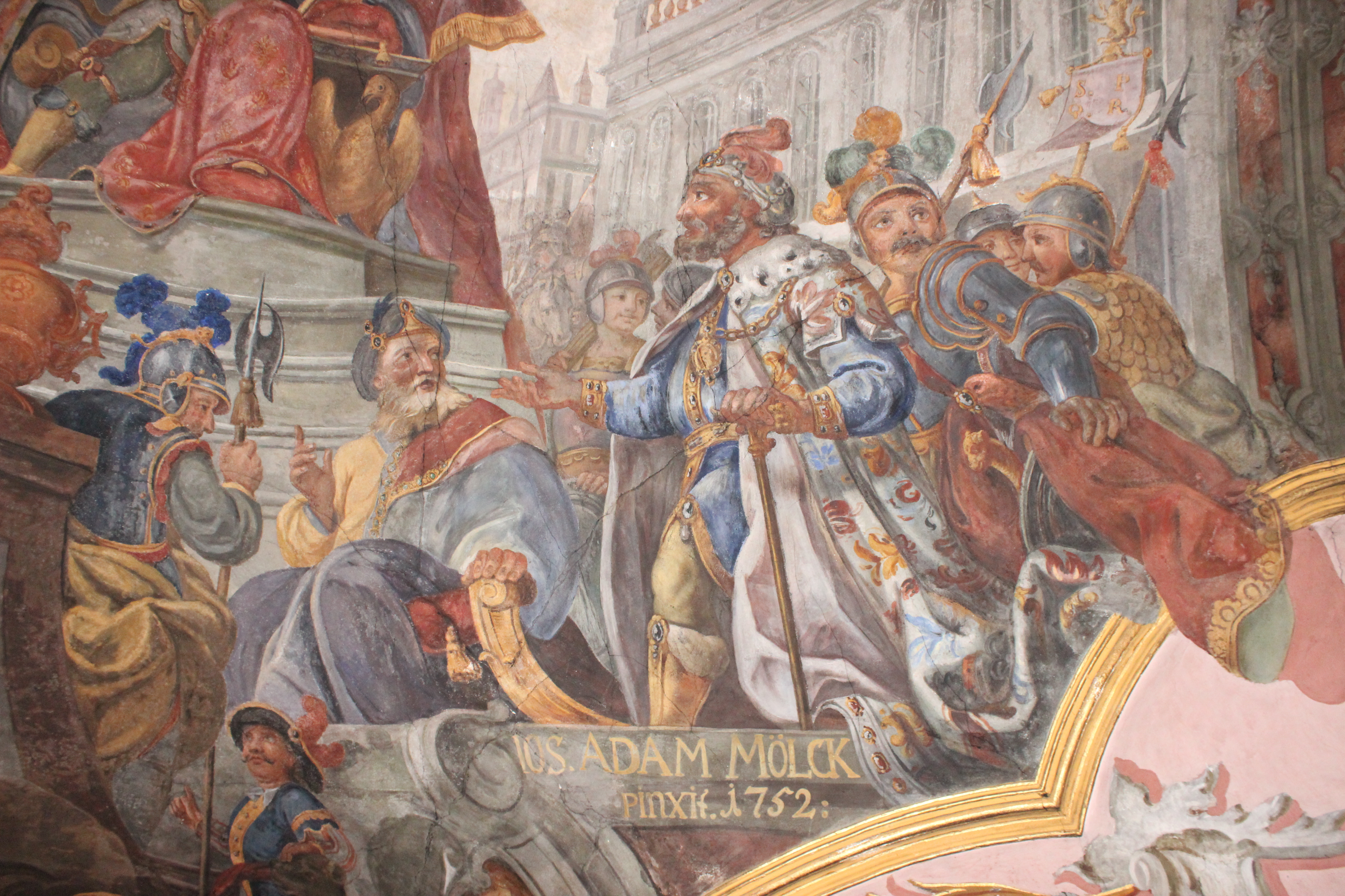 Signature: JOS. ADAM MÖLCH pinxit 1752